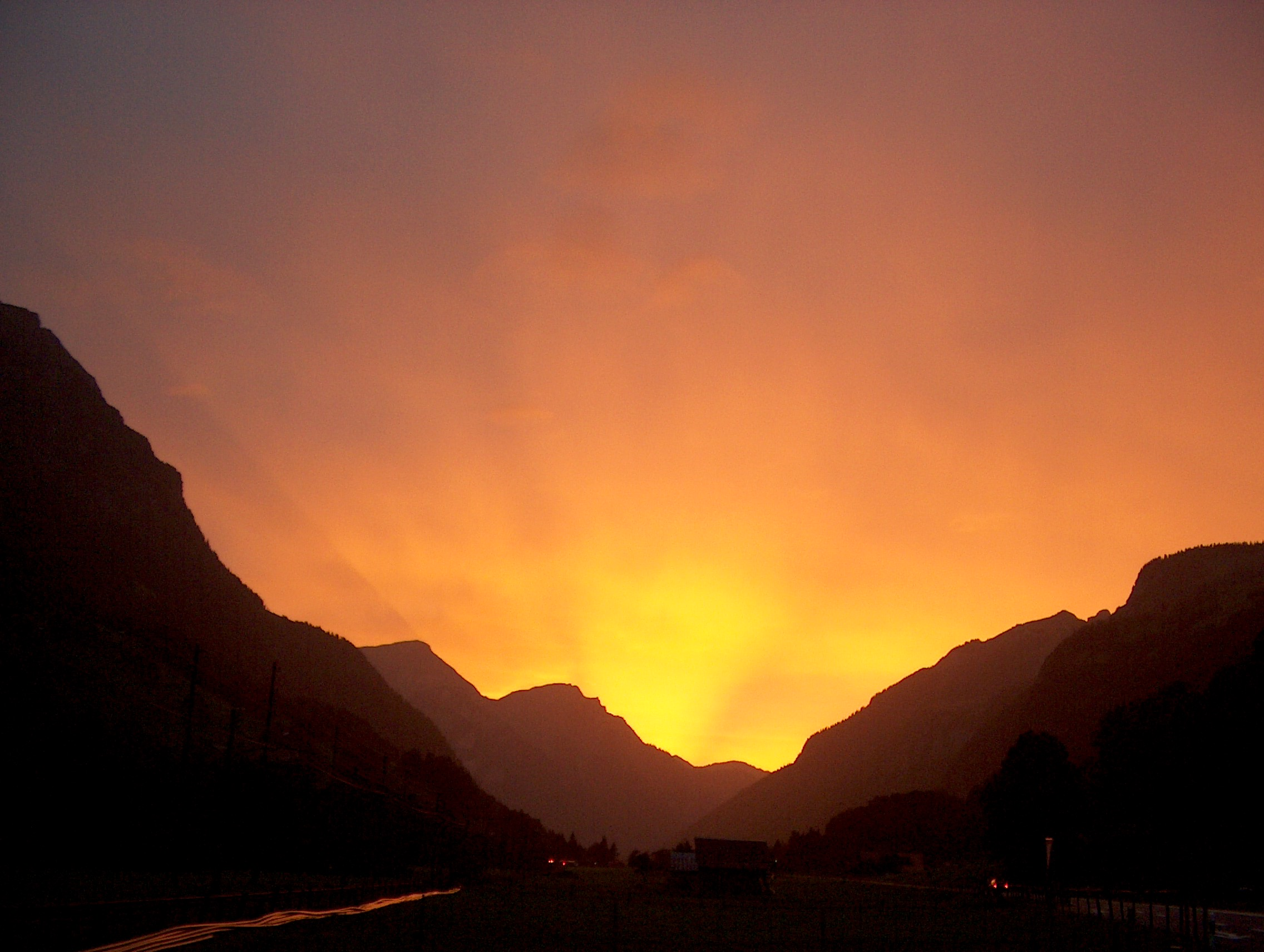 Sonnenuntergang in den Bergen